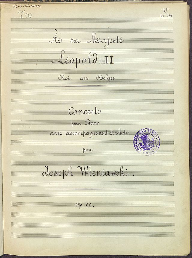 Page de garde du Concerto pour piano, op. 20, dédié à Léopold II, roi des Belges